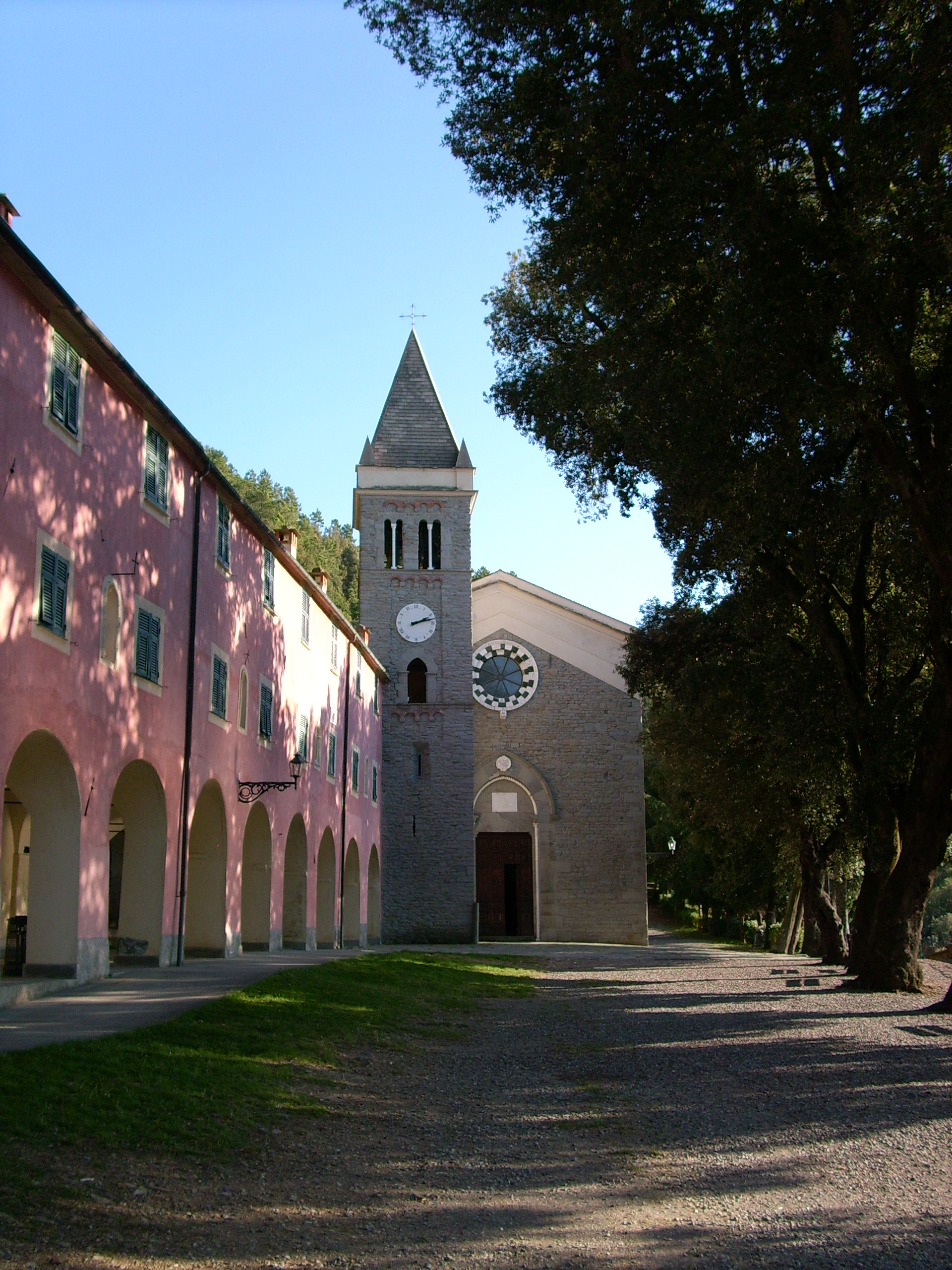 Santuario di Nostra Signora di Soviore, Monterosso al Mare, Liguria, Italia